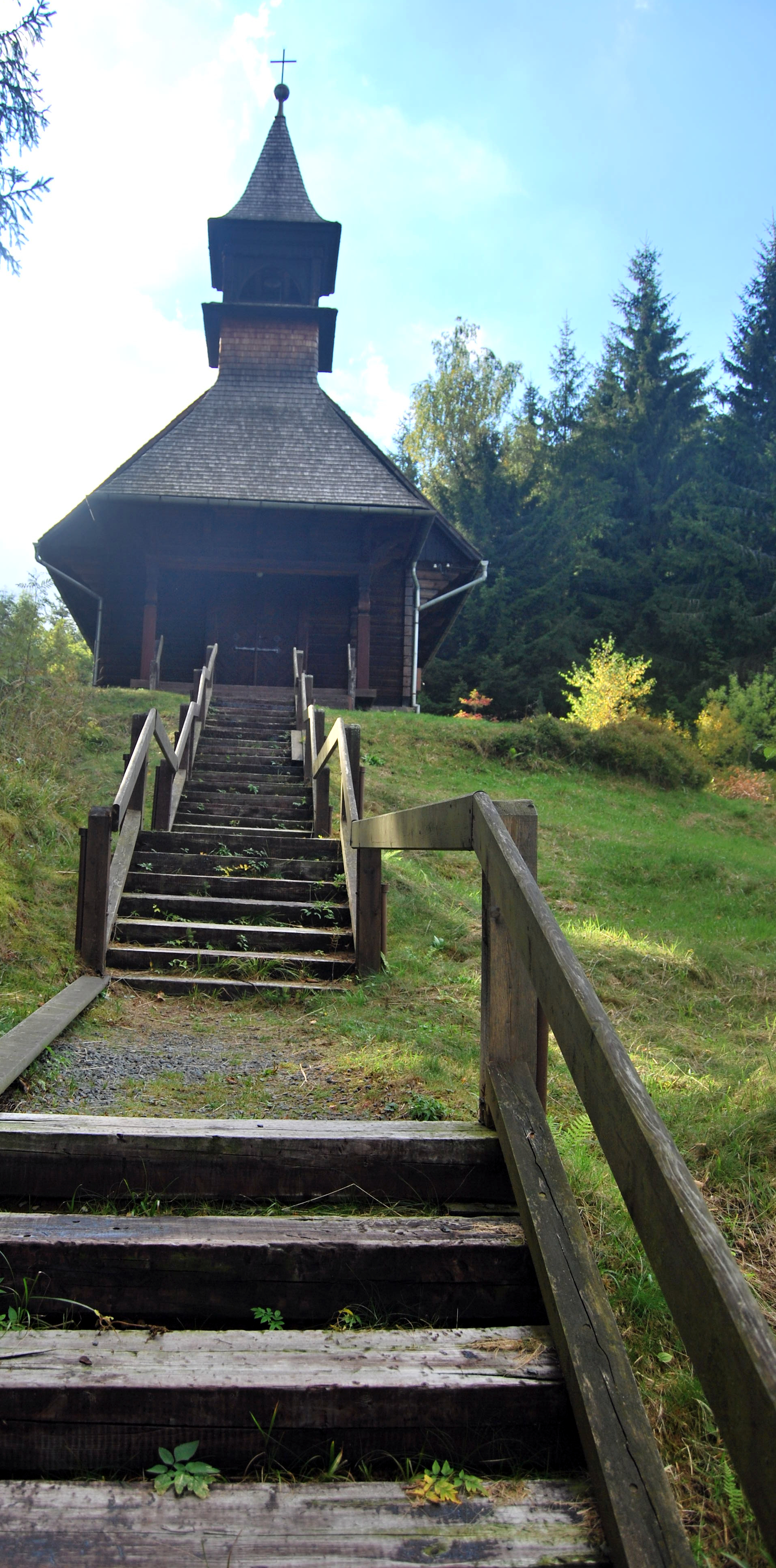 Kaple sv. Hedviky (Vidly), na stráni nad hotelem Adam, Vidly